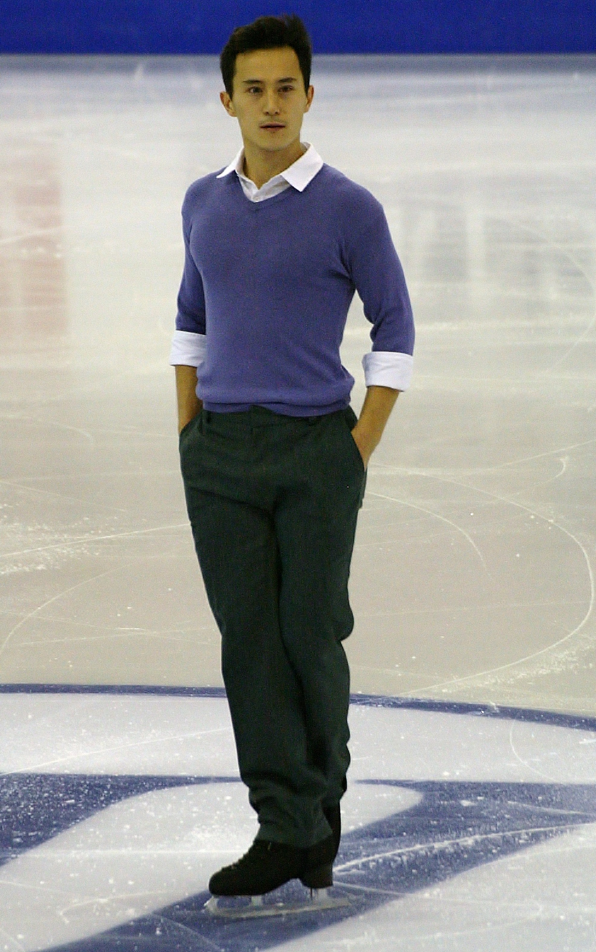 Патрик Чан (Канада) на финале Гран-при по фигурному катанию 2015-2016.